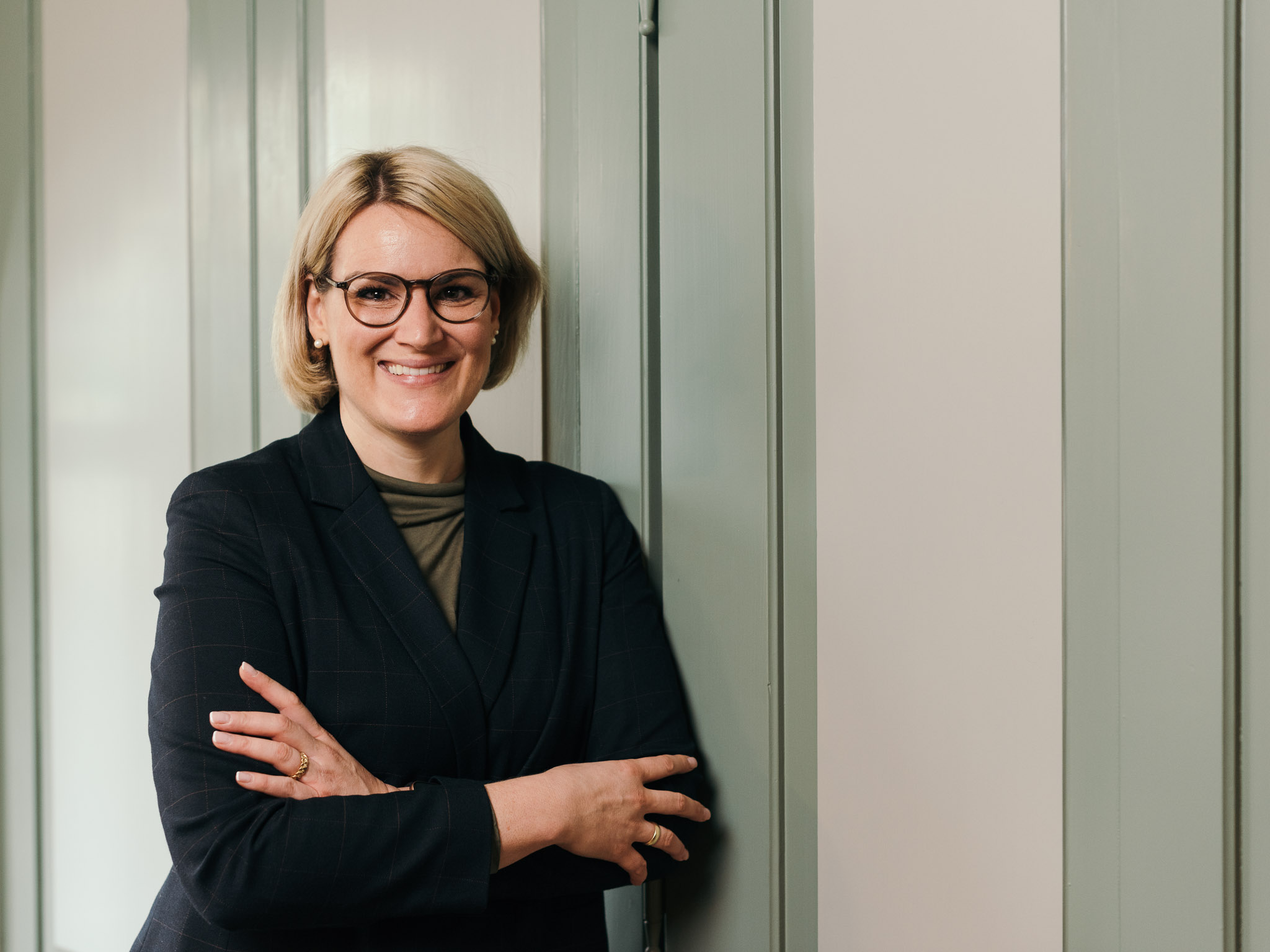 Eva Weber